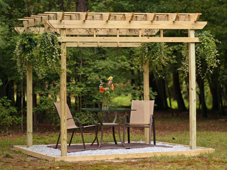 Contoh Pergola